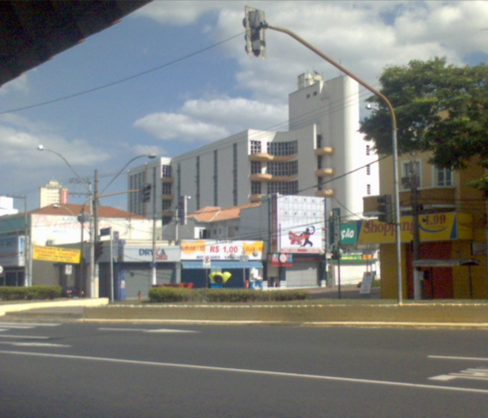 Avenida Dr Antonio Lobo, Americana - São Paulo - Brasil